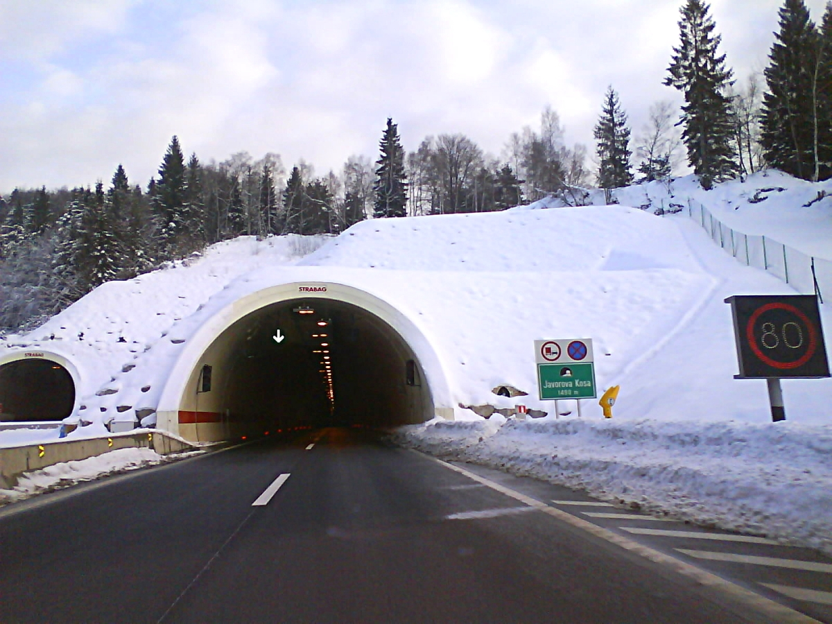 Autocesta A6